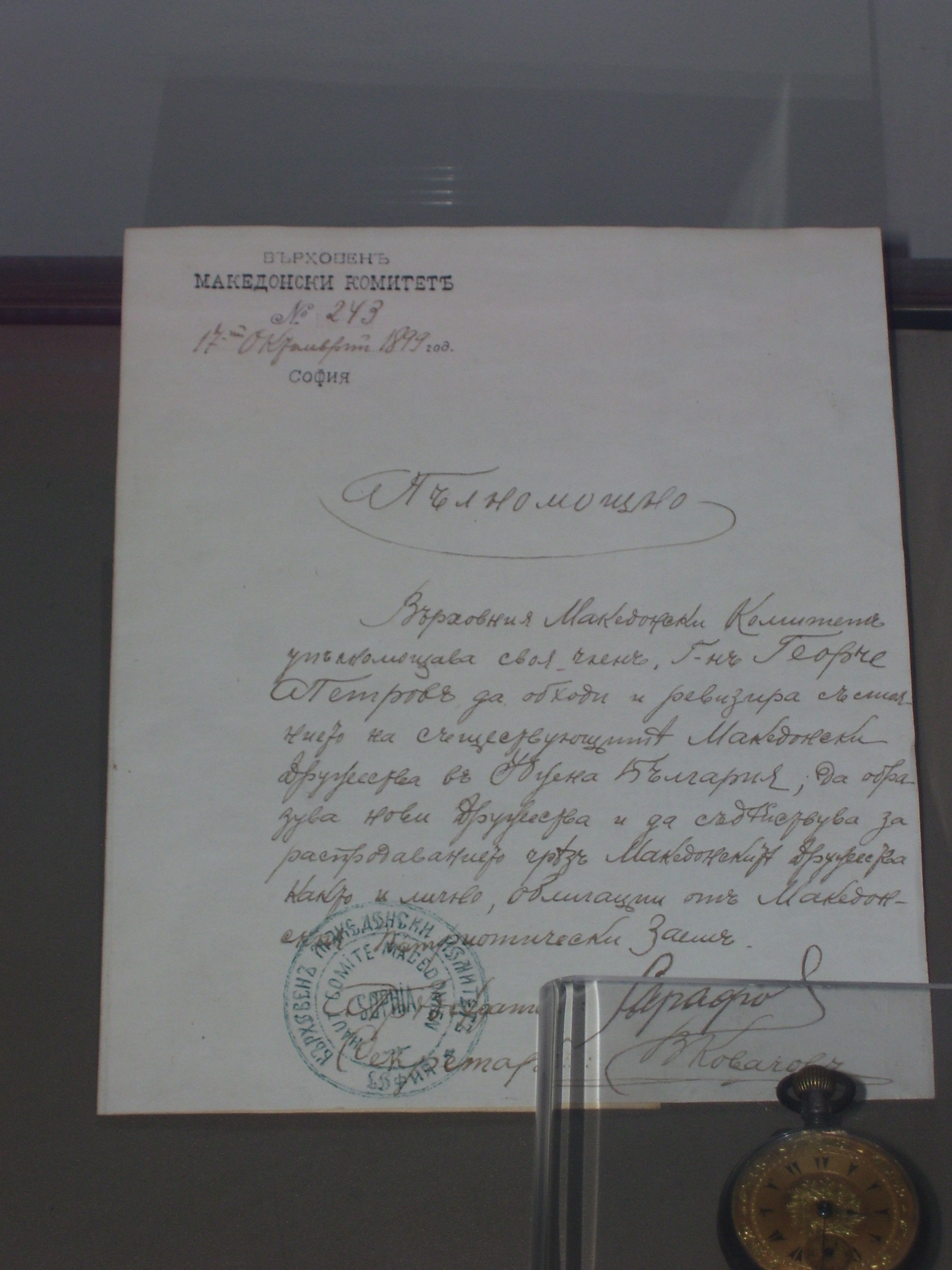 Пълномощно от Върховния македонски комитет на Гьорче Петров от 17 октомври 1899 година.